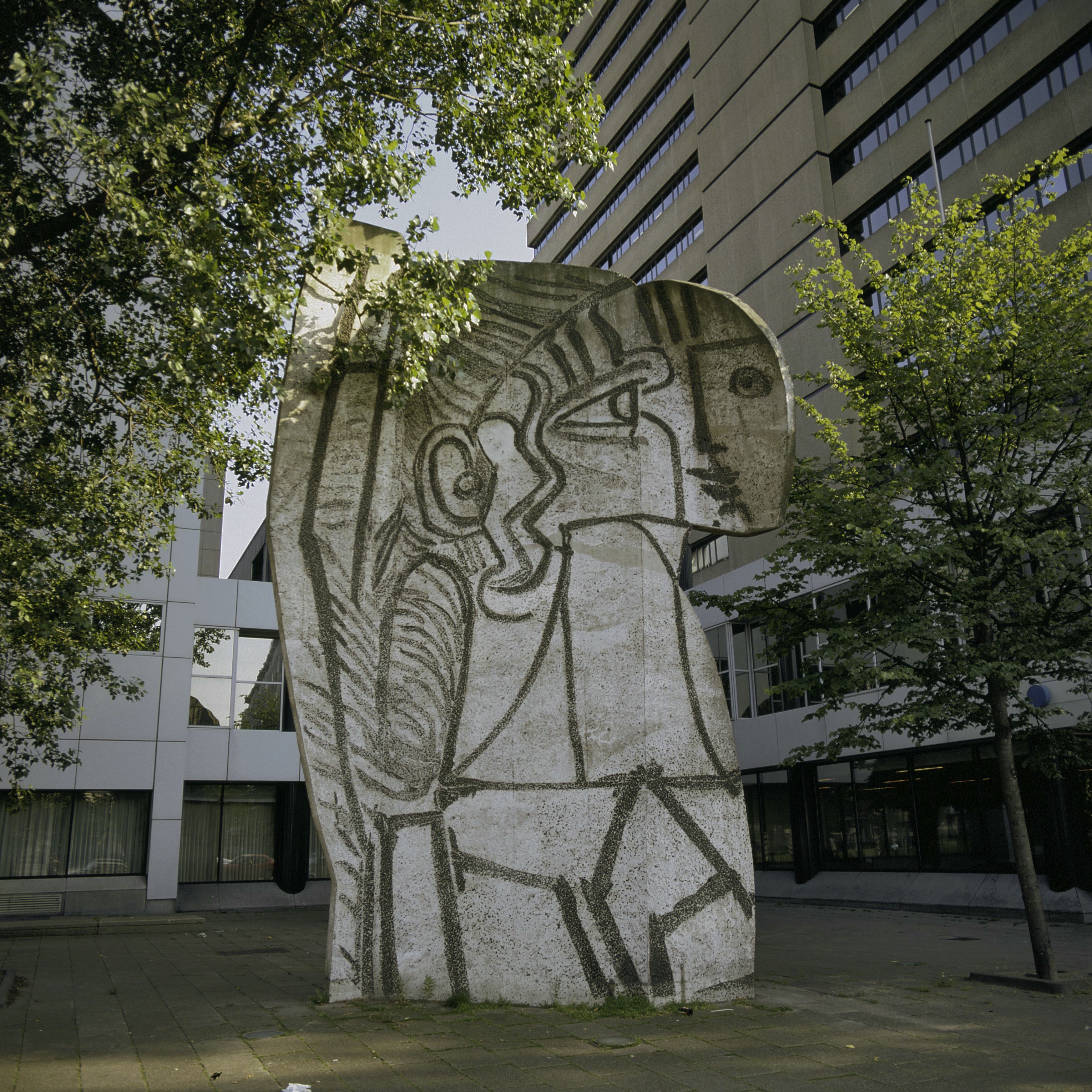 Bouwcentrum: Overzicht van Sylvette, gezandstraald beeld, een betonnen tekening, beeld van Picasso (opmerking: Gefotografeerd voor Monumenten van Herrezen Nederland)